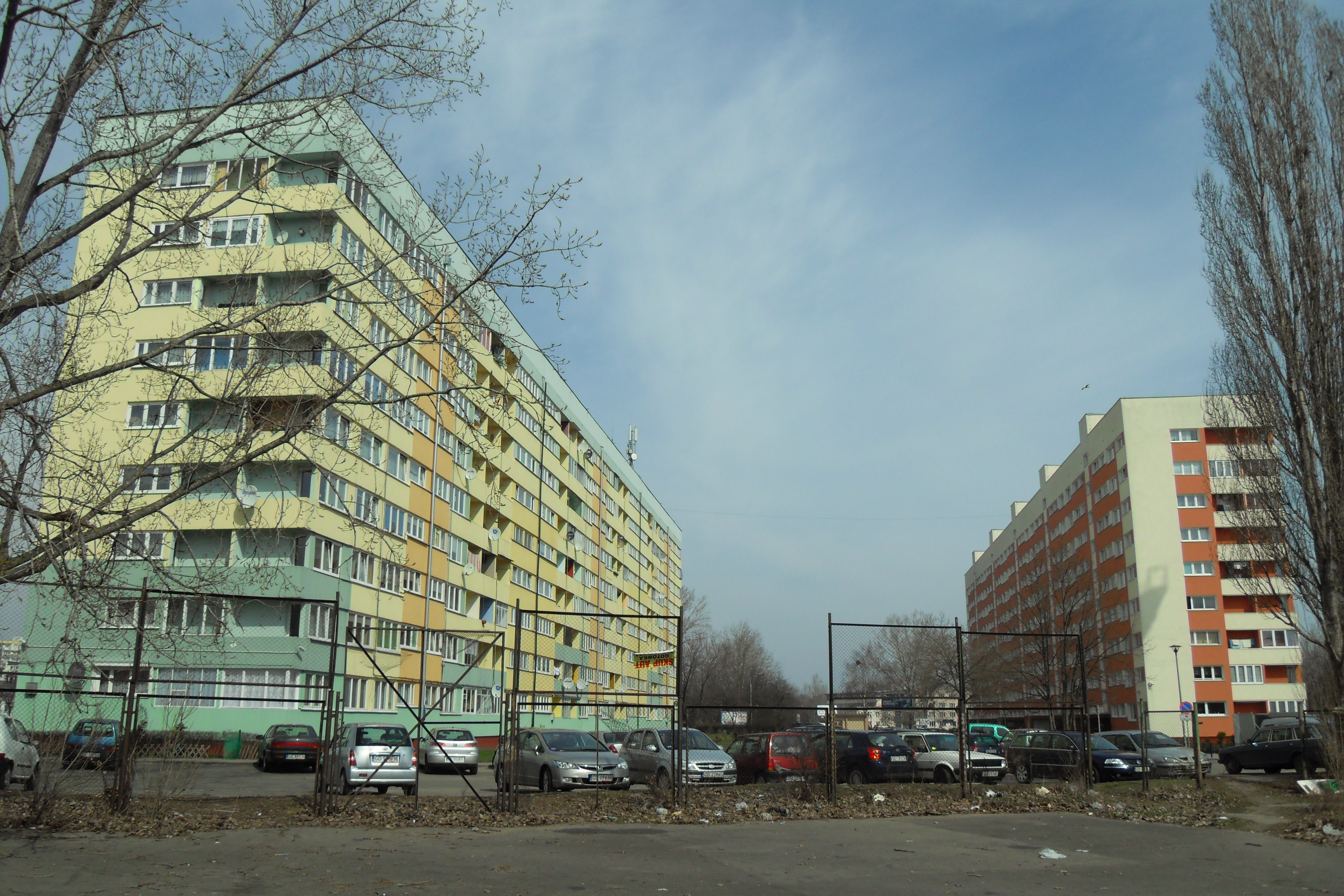 Gdańsk Przymorze Wielkie, ul. Kołobrzeska 54 i 56 (tzw. bloki "leningradzkie").